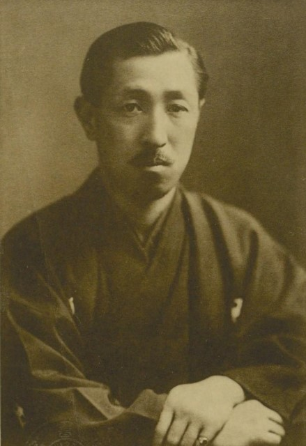 左右田喜一郎（1881～1927）